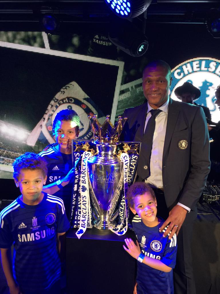 célèbre sa victoire en Premier League avec ses enfants